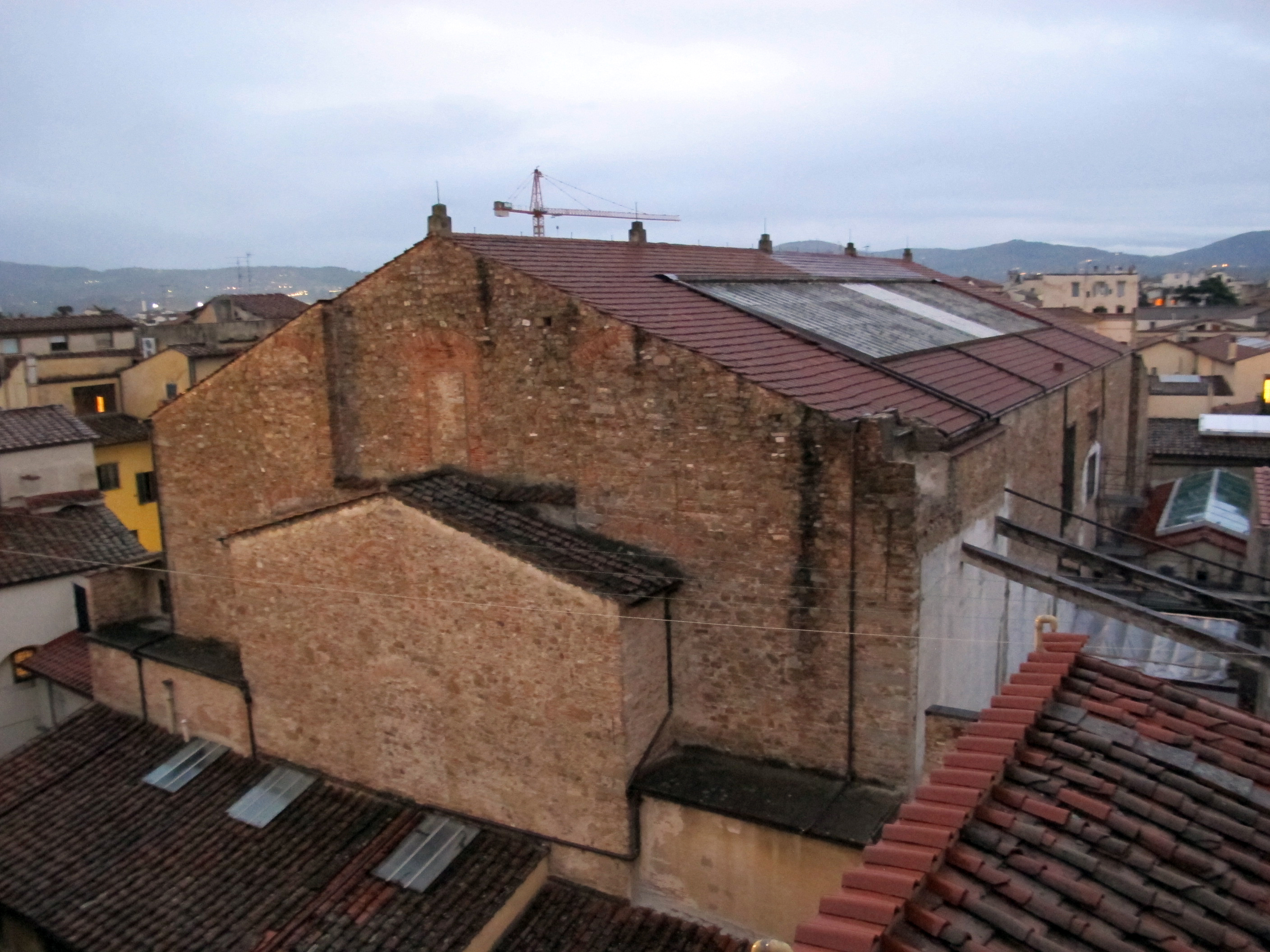 Ex-Teatro degli Intrepidi, retro 3